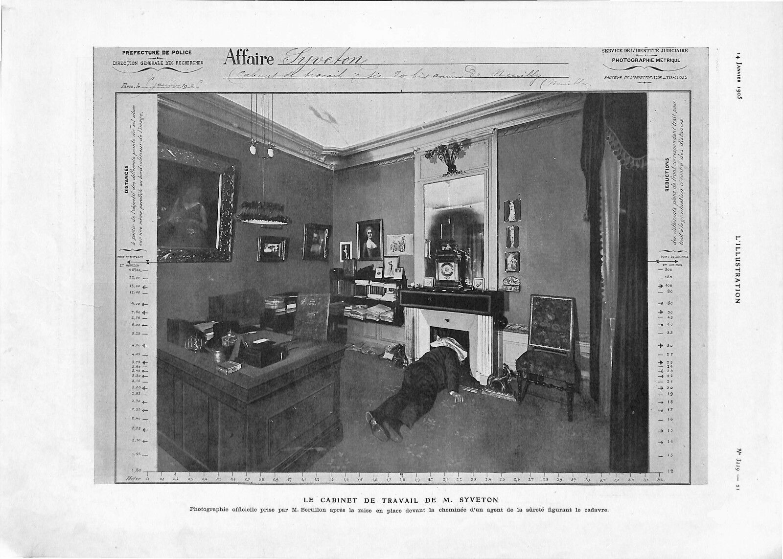 Photographie officielle prise par M. Bertillon après la mise en place devant la cheminée d'un agent de la sûreté figurant le cadavre.